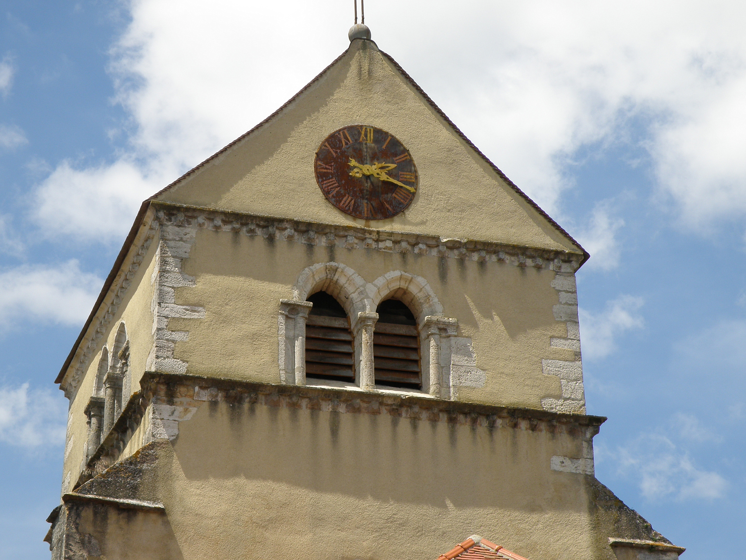 Volnay (Côte d'Or, Bourgogne, France). Église Saint-Cyr-et-Sainte-Julitte.